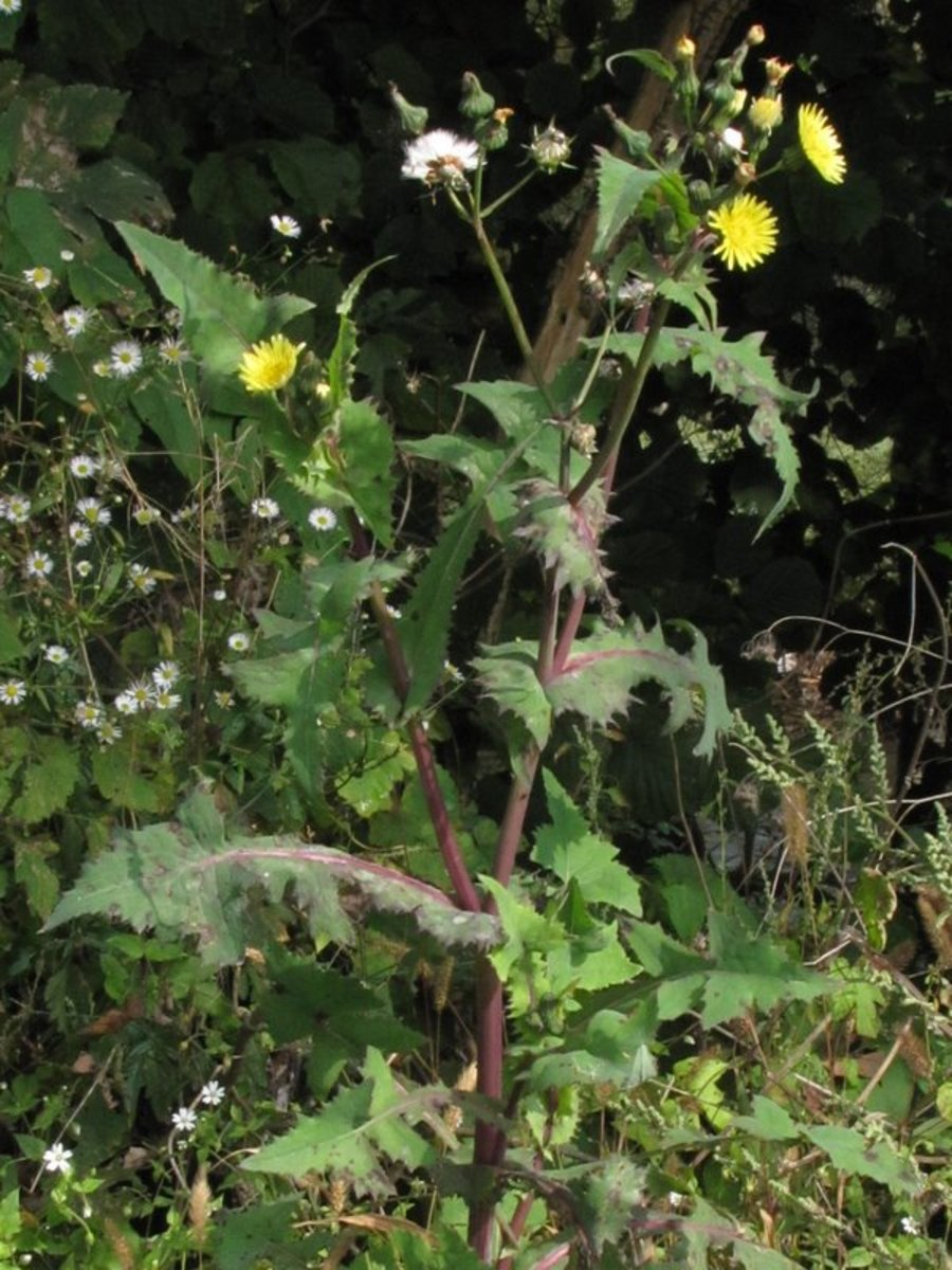 Navadna škrbinka v Ljubljani-Polju.